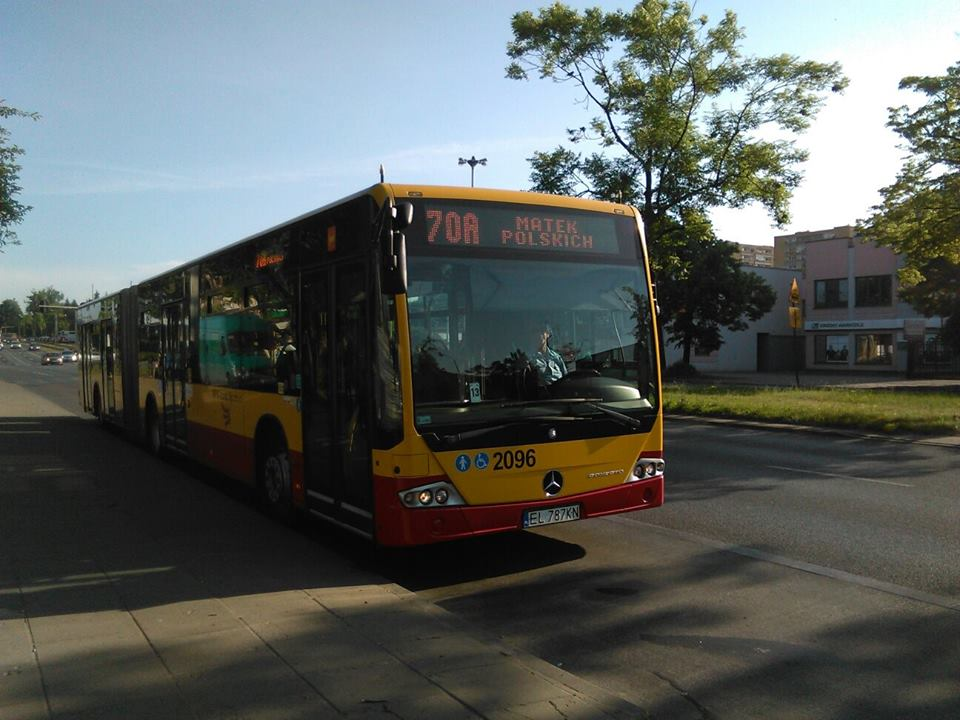 Mercedes stoi na rzgowskiej